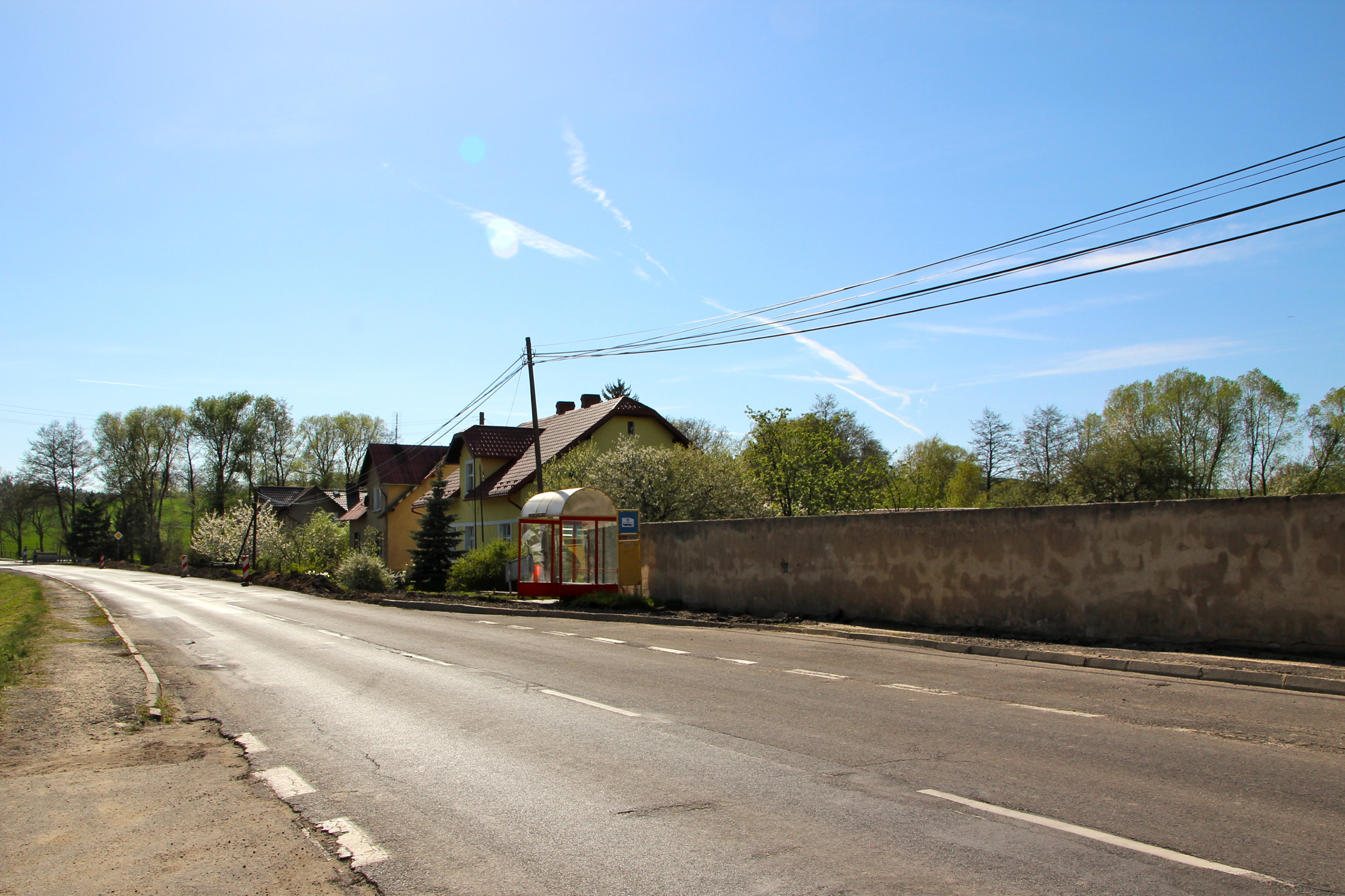 Mokre-Kolonia – wieś w Polsce położona w województwie opolskim, w powiecie głubczyckim, w gminie Głubczyce, w gminie Głubczyce.